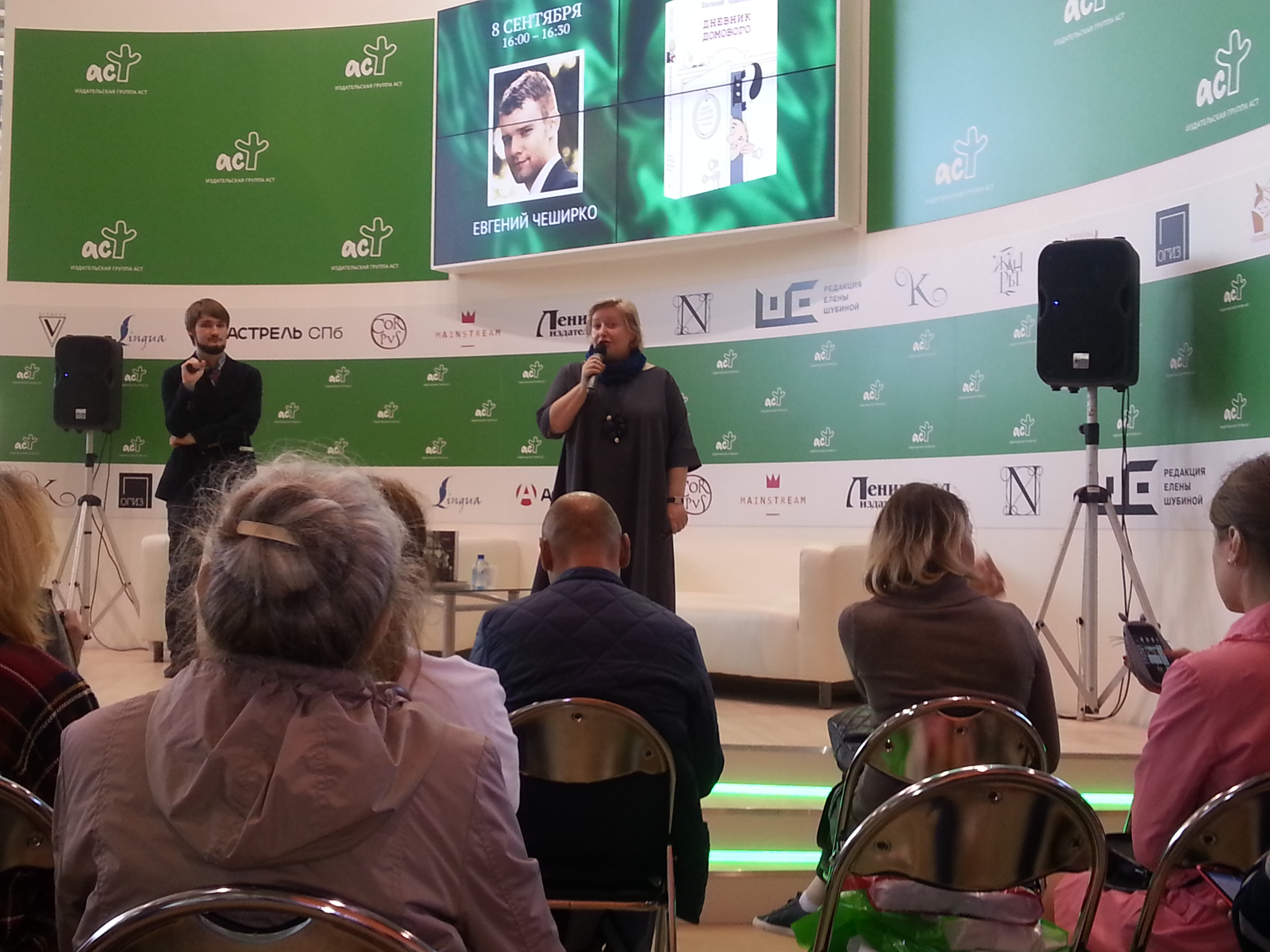 Российская журналистка и правозащитница Ольга Романова на презентации своей книги "Бутырка. Тюремная тетрадь" 8 сентября 2016г.